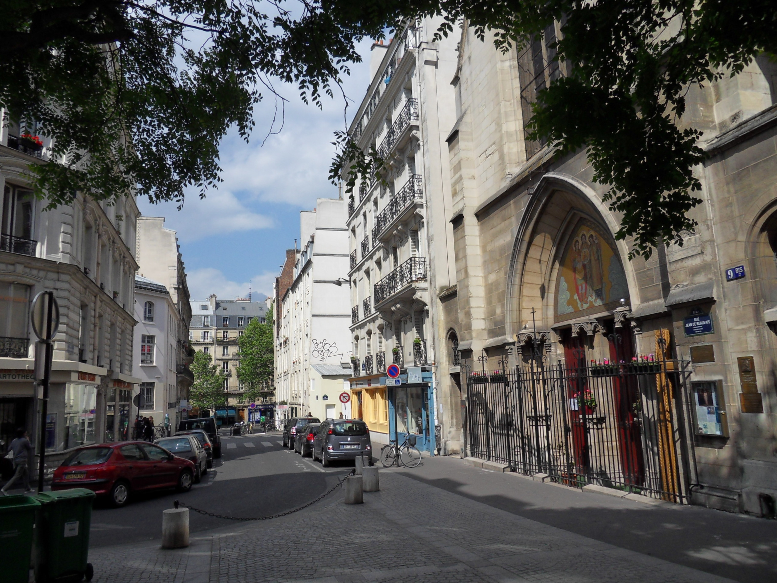 Rue Jean-de-Beauvais (Paris), avec l'église orthodoxe roumaine